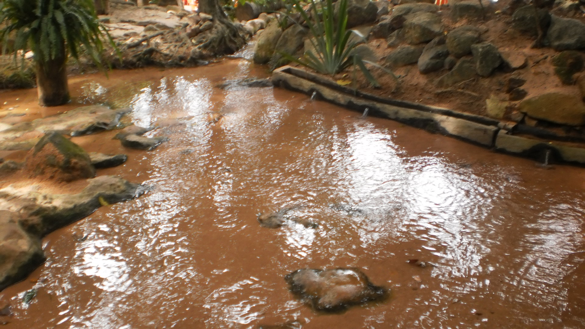 Antigo bebedouro de água mineral. Balneário do Caldas - Barbalha - Ce.